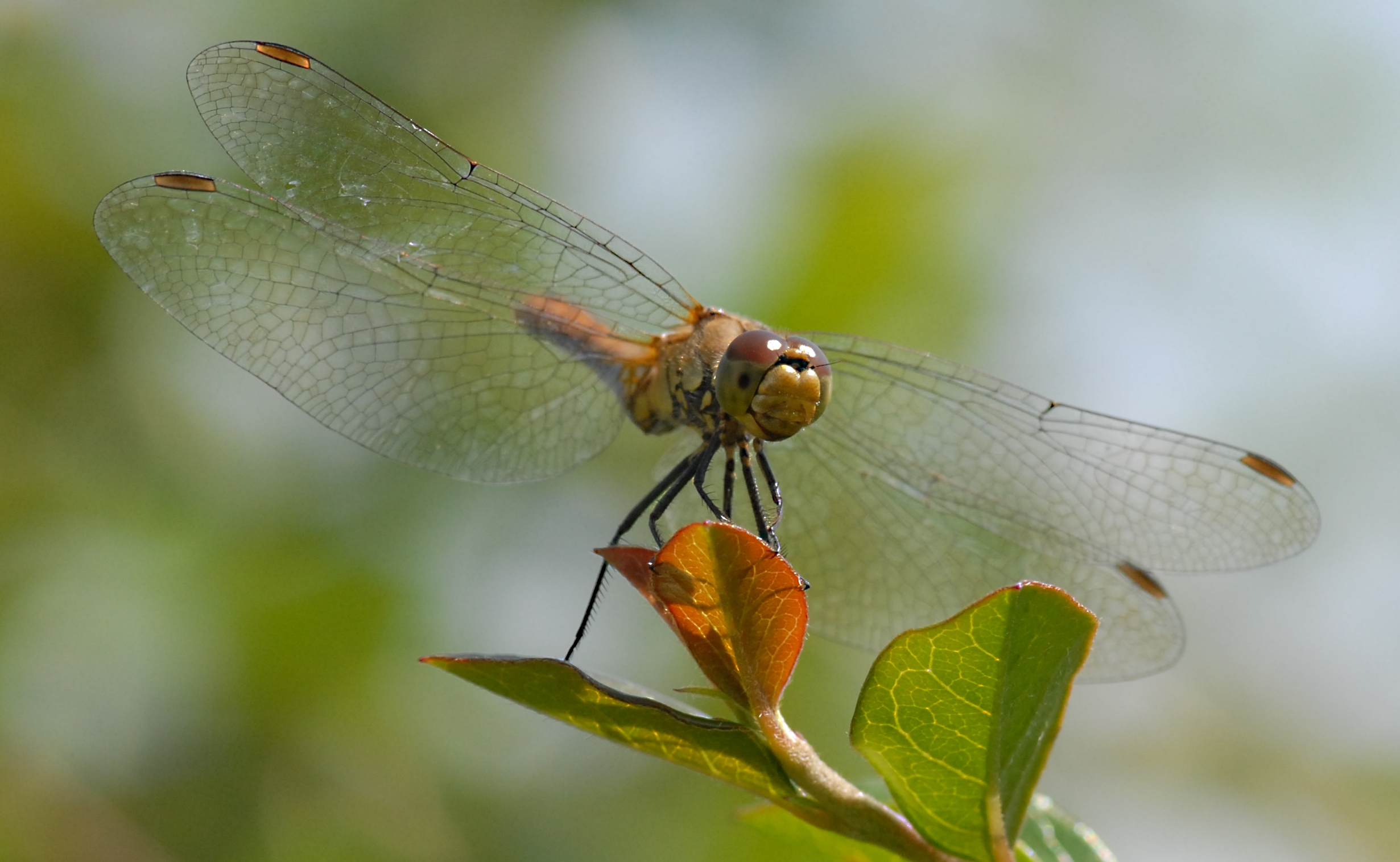 Weibliche Heidelibelle (Sympetrum sp.) in meinem Garten, Norddeutschland